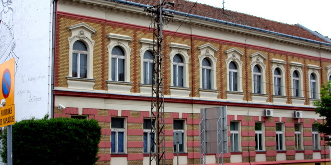 Dom učenika Zrenjanin